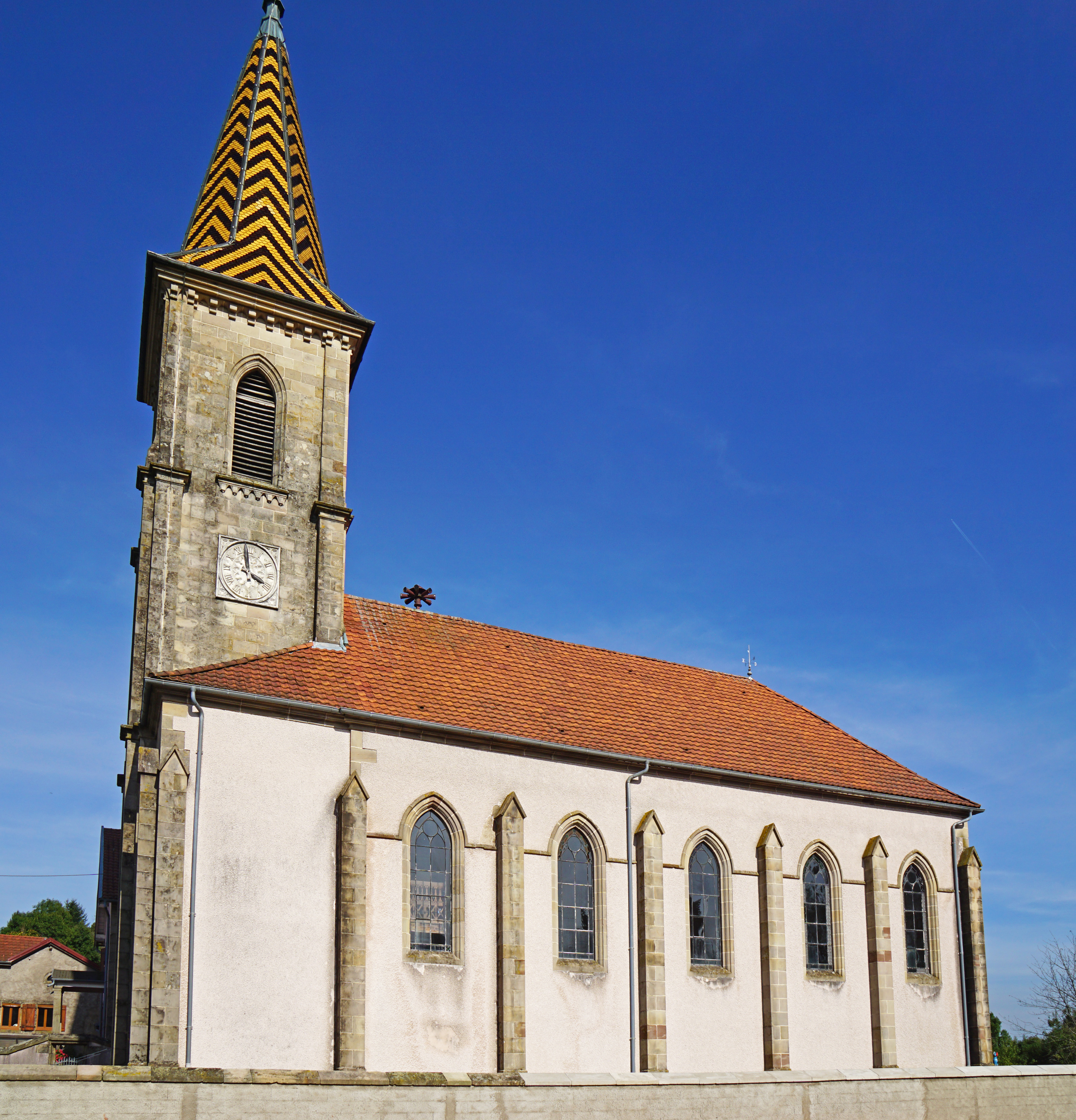 Temple protestant d'Étobon.